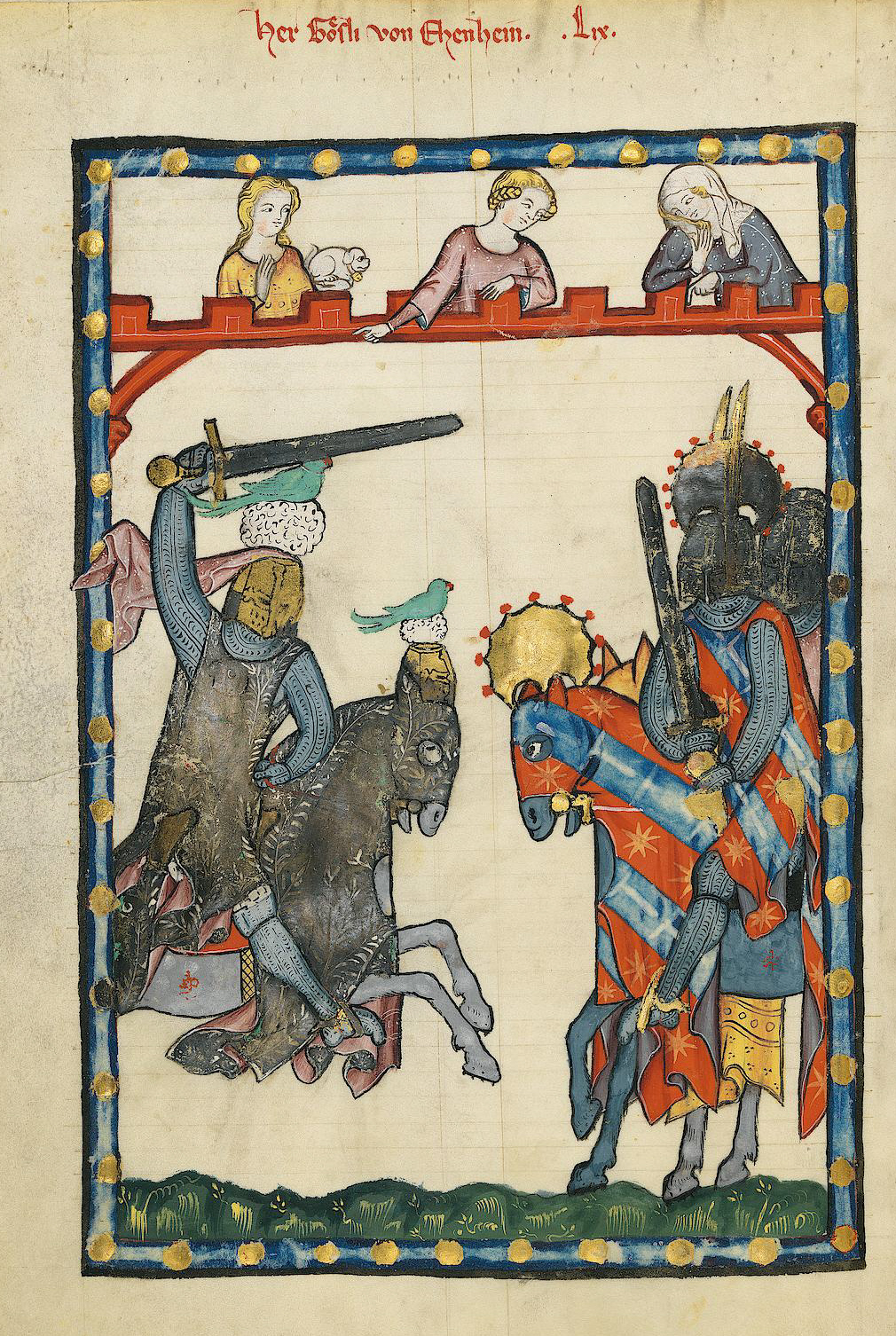 Codex Manesse, UB Heidelberg, Cod. Pal. germ. 848, fol. 197v: Herr Goesli von Ehenheim